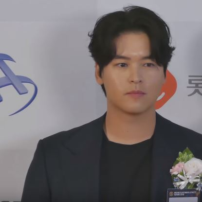 17일 오후 서울시 영등포구 여의도 콘래드 서울에서 '2019 브랜드 고객충성도 대상' 시상식이 열려 남자배우 부문 수상자 이장우가 참석해 포토타임에 포즈를 취하고 있다.